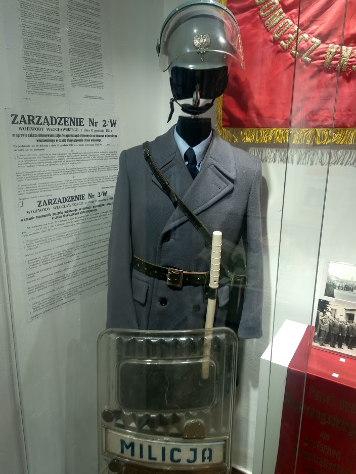 Muzeum Historii Włocławka (2019 r.)